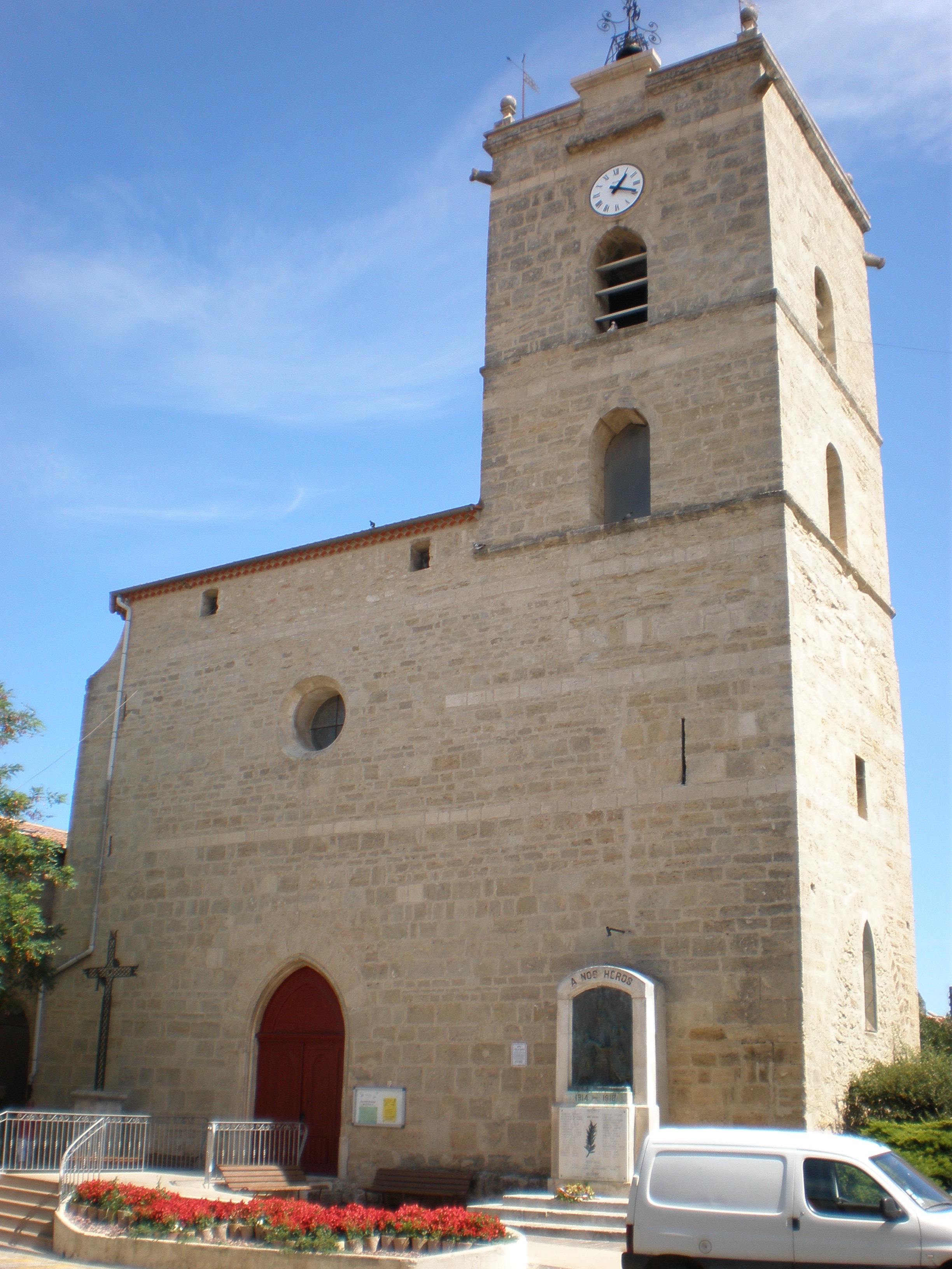 Église Saint-Étienne de Boujan-sur-Libron (Hérault)